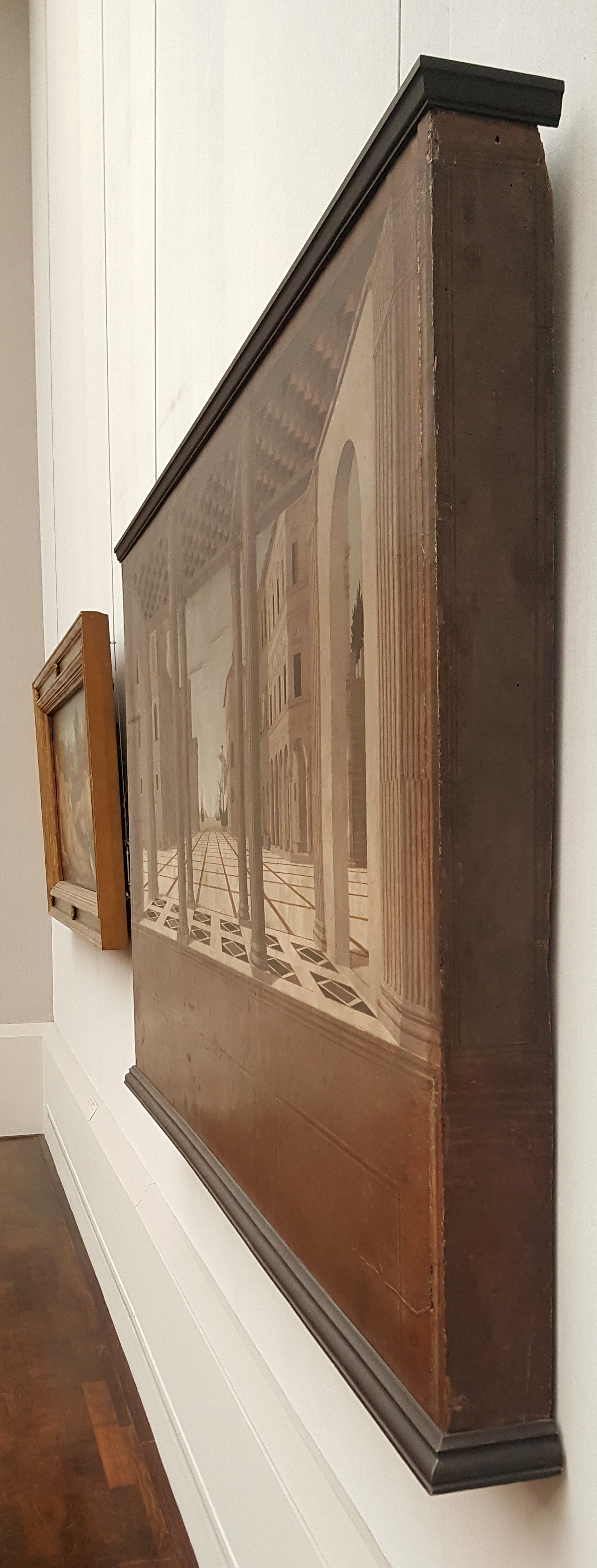 Gemälde der frühen Neuzeit in der Gemäldegalerie Berlin